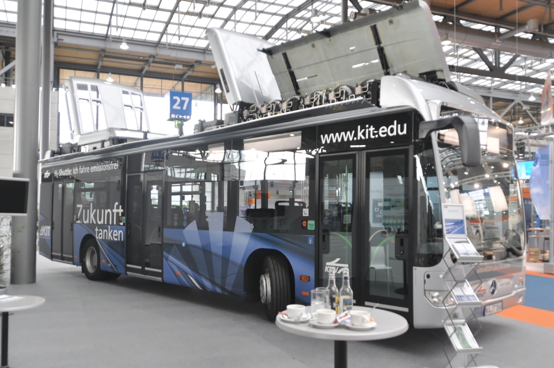 Hannover-Messe April 2012 Dieses Foto entstand durch die Mithilfe des gemeinnützigen Vereins Skillshare bei der Akkreditierung als Fotograf. Infos unter skillshare.eu Skillshare e.V. ist ein eingetragener gemeinnütziger Verein zur Förderung der Bildung durch Unterstützung der Erstellung, Sammlung und Verbreitung so genannten freien Wissens. IBAN: DE16 8306 5408 0004 8850 66 BIC: GENODEF1SLR Bank: VR-Bank Altenburger Land